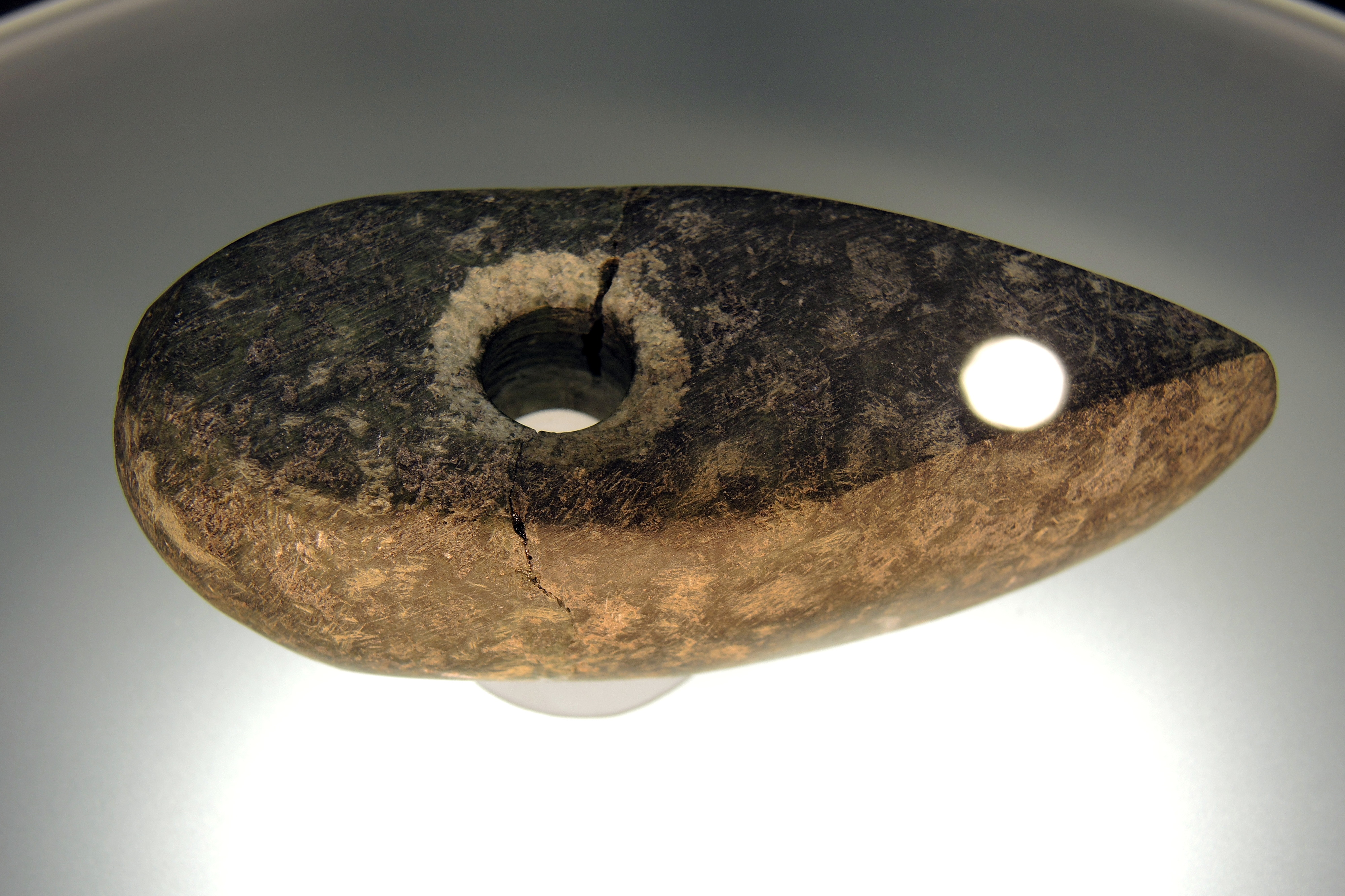 Ausstellung Archäologie im Parkhaus Opèra, Exponat aus der Grabung Parkhaus Opéra in Zürich (Switzerland) : Lochaxt der Horgener Kultur